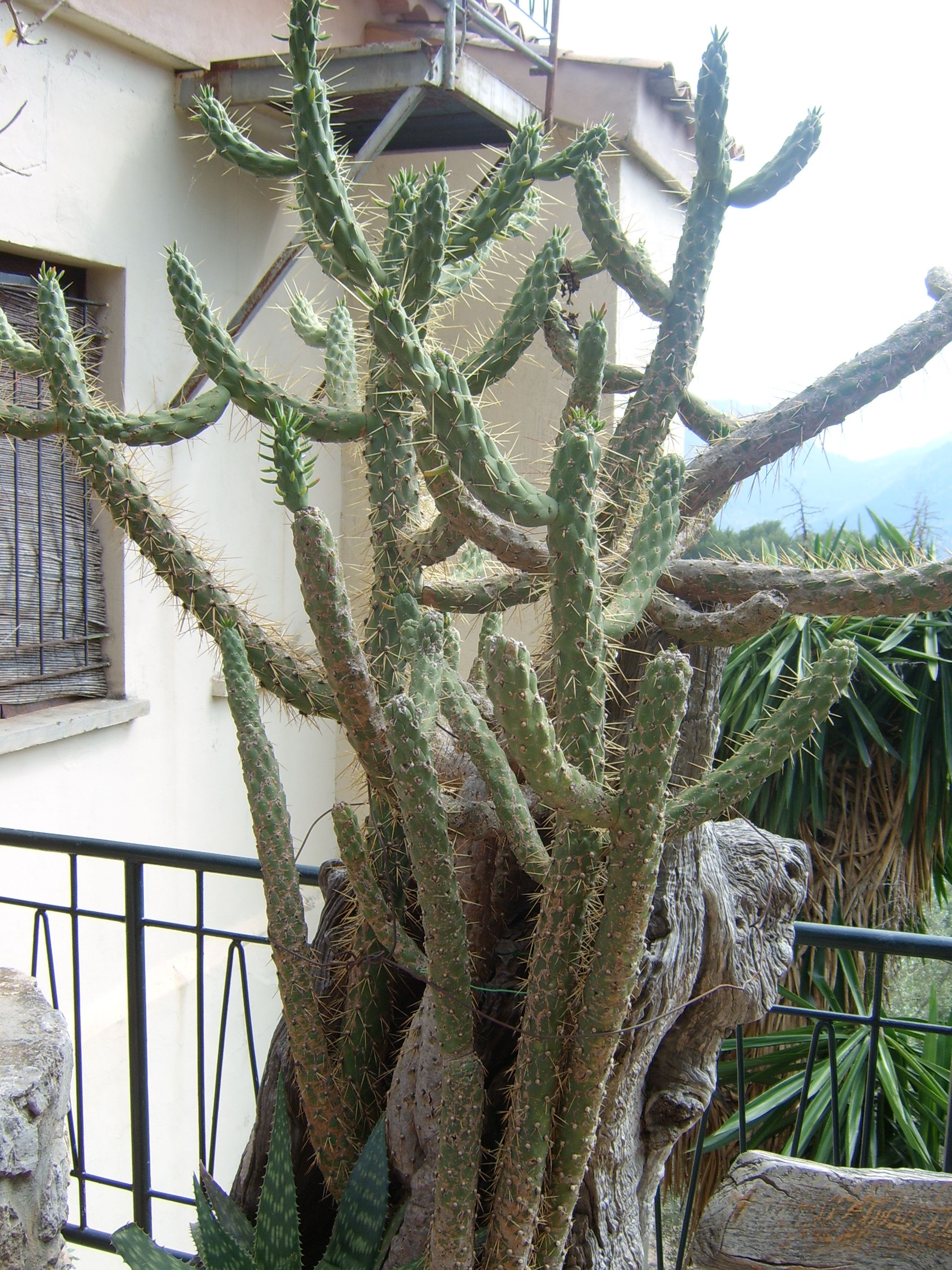 Kaktus Mallorca 2008